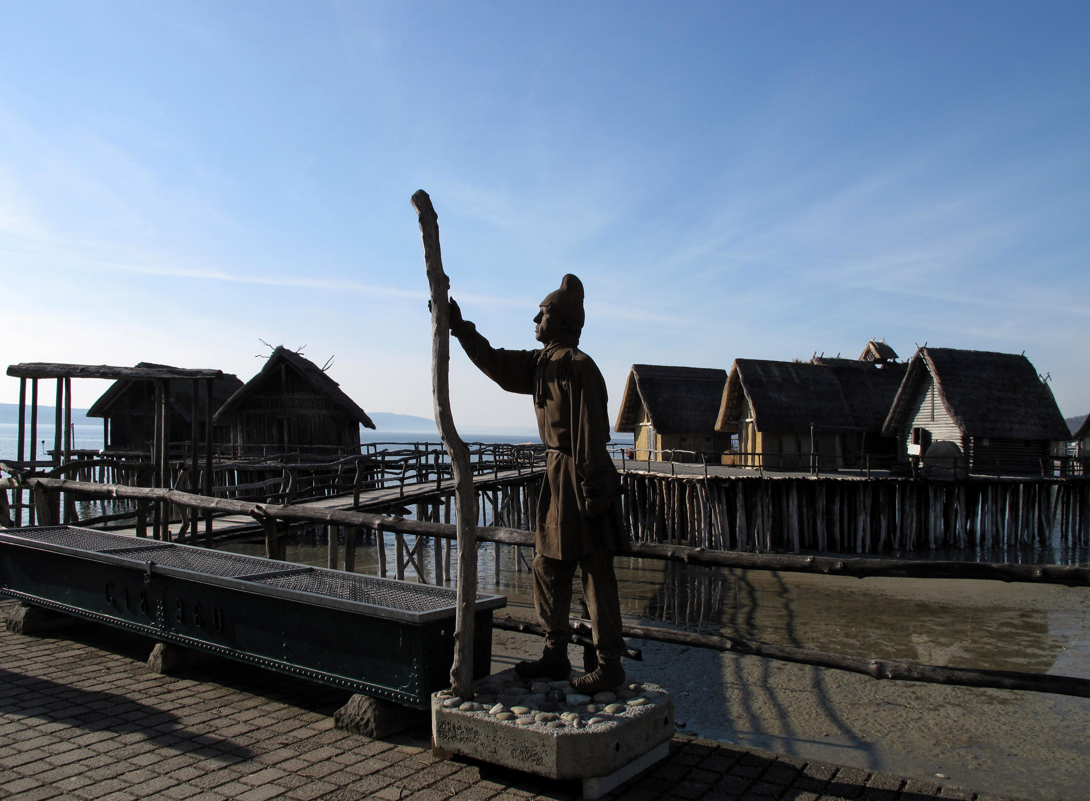 Museo de Palafitos de Uhldingen-Mühlhofen, barrio Unteruhldingen (Lago Constanza, Alemania)